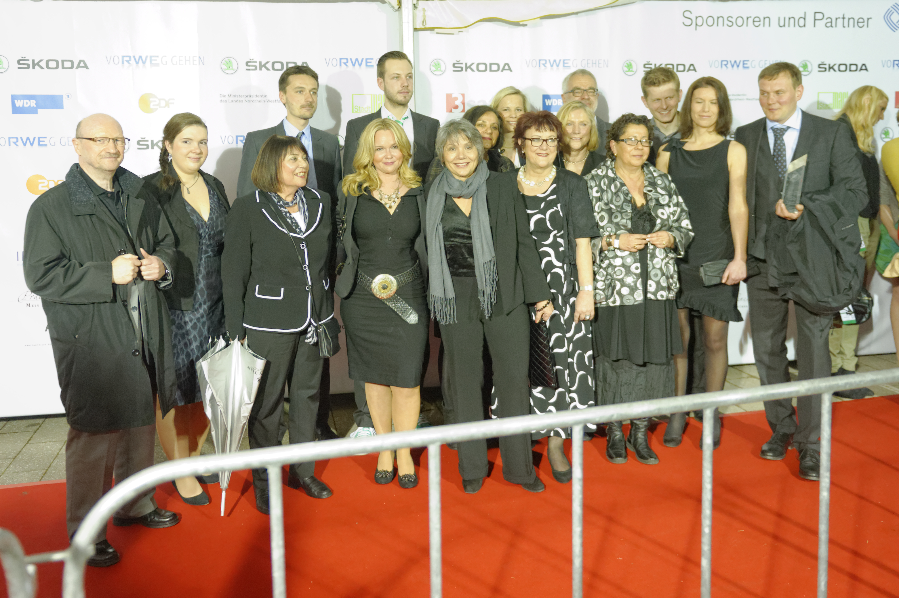 Grimme-Preis 2013 Pressekonferenz und Preisverleihung